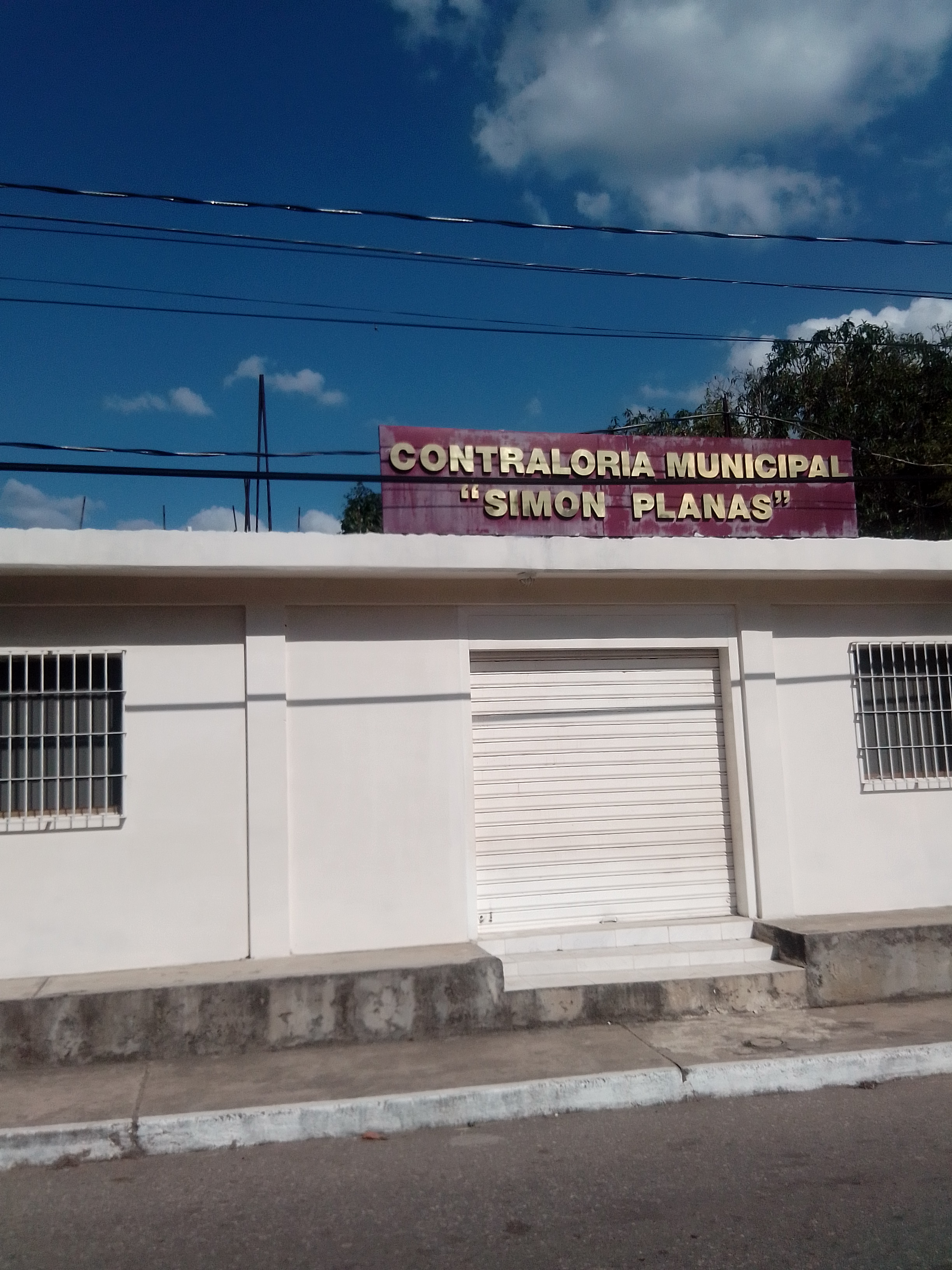 Contraloria del Municipio Simón Planas